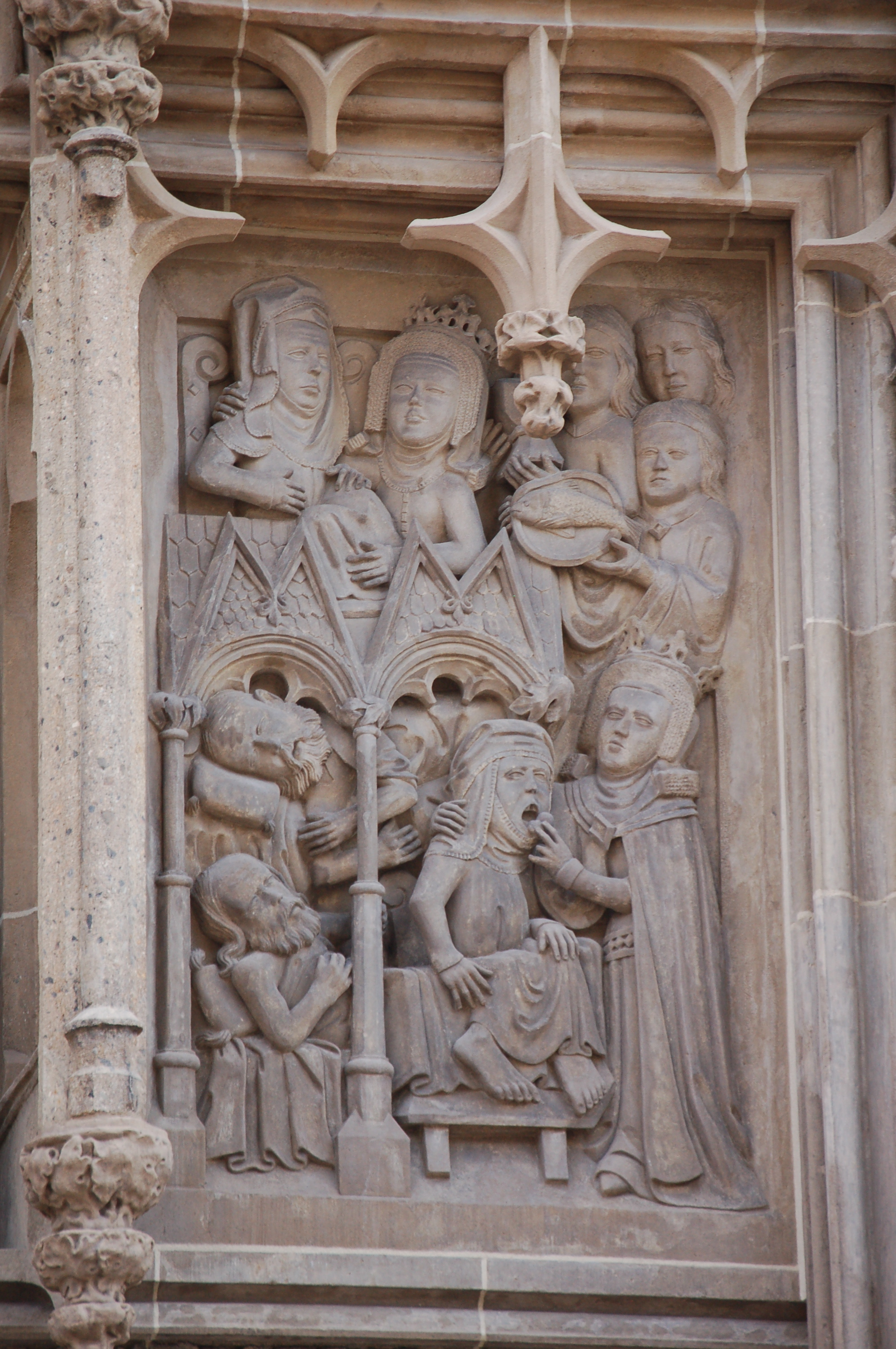 Détail du portail nord de la cathédrale Sainte Élisabeth à Kosice. Scène de la vie de Saint Élisabeth.